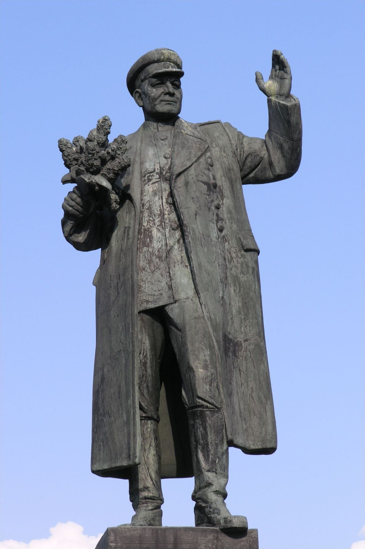 Ivan Stěpanovič Koněv, socha na náměstí Interbrigády, Praha-Bubeneč